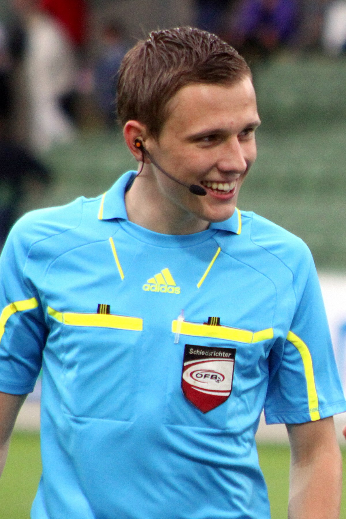 Sebastian Gishamer, Fußballschiedsrichter